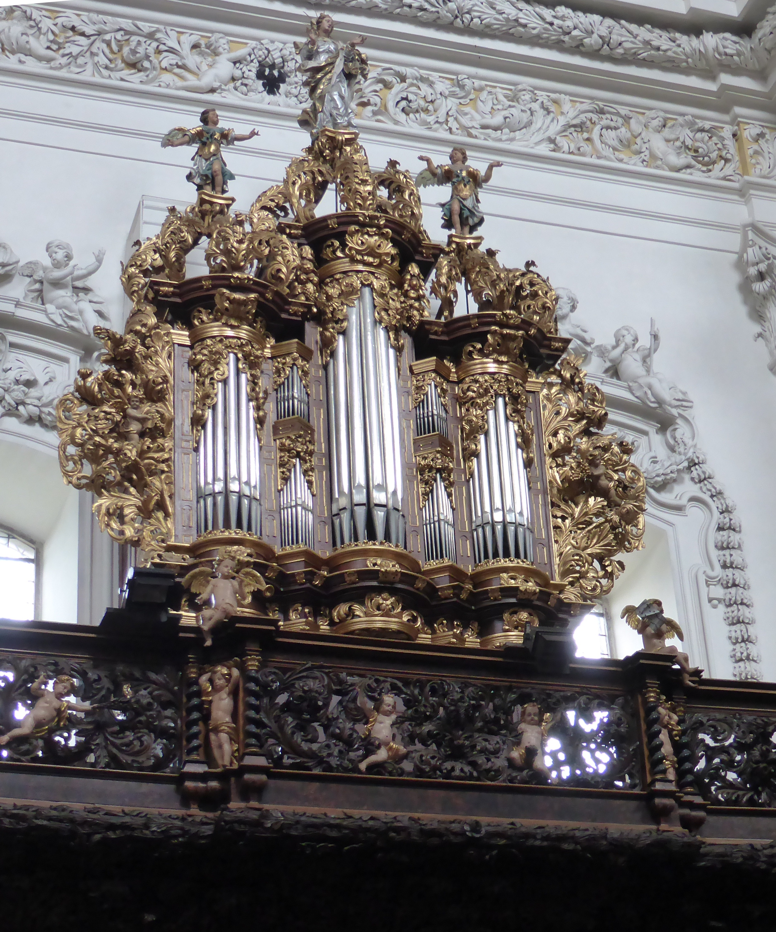 Leopold Freundt Orgel 1699